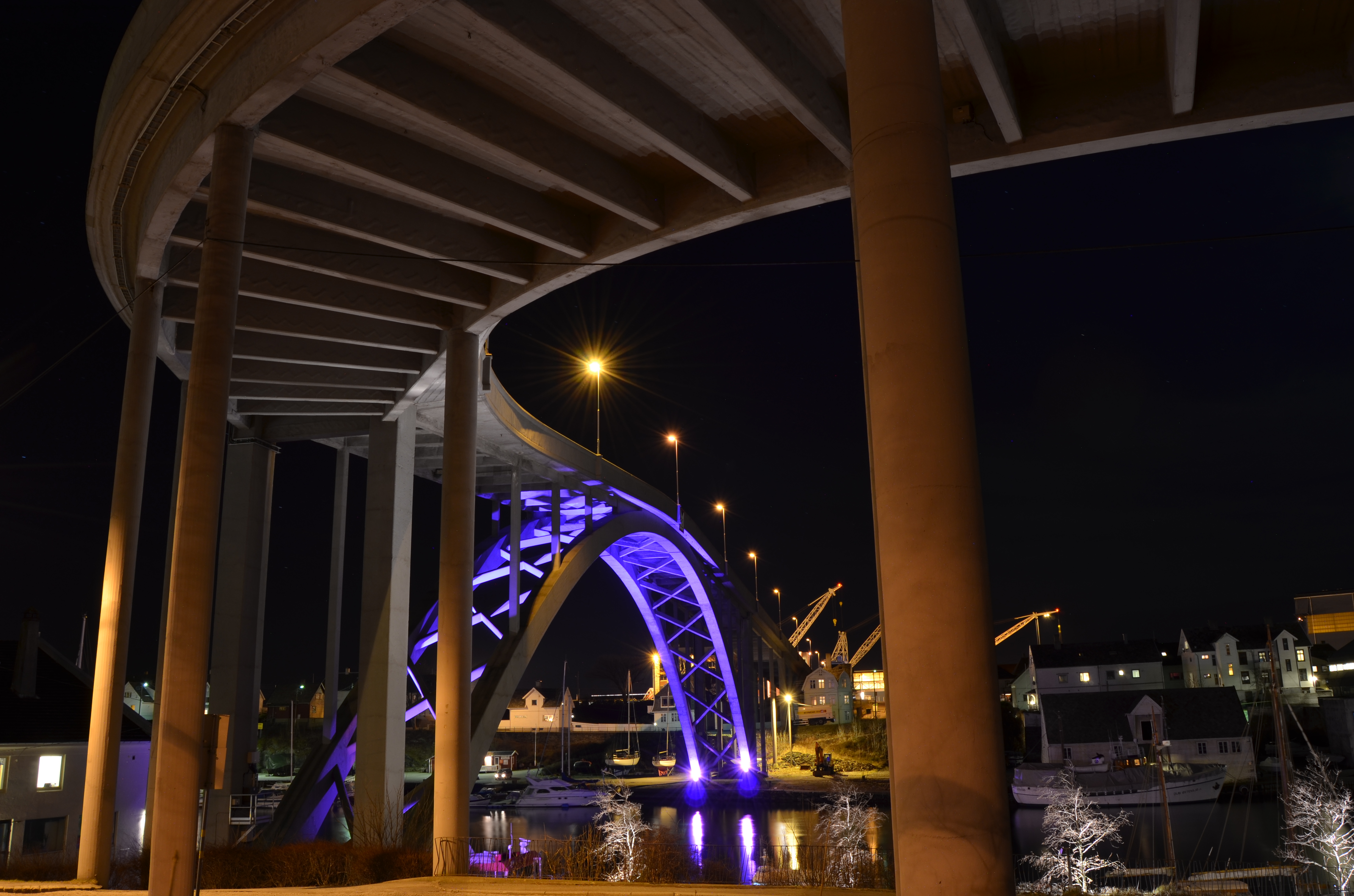 Risøybrua sett fra Haugesund